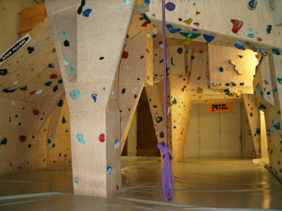 Zicht in Indoor-Blokklimzaal